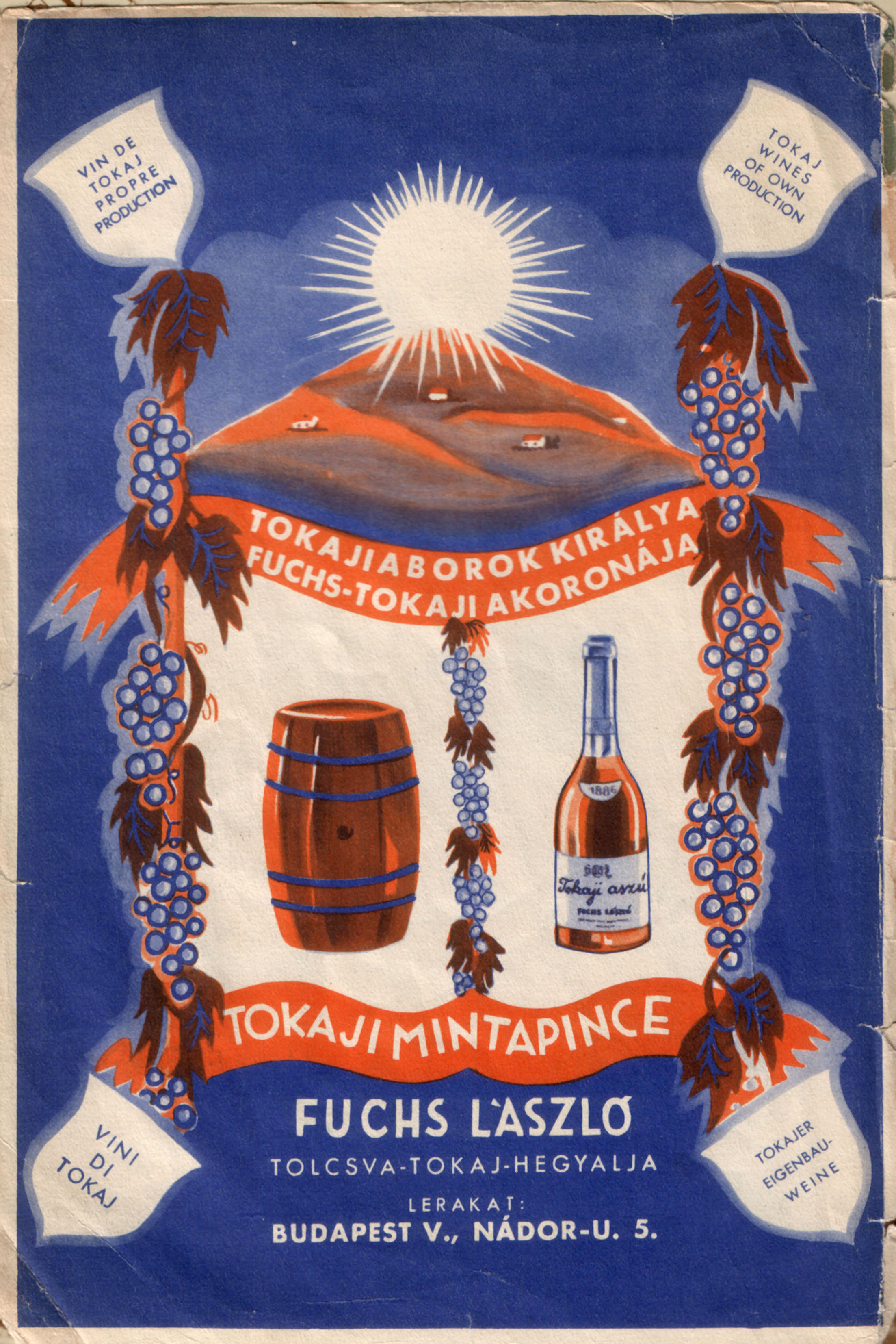 Tokaji bor ún. kis-plakát (A/5), 1938.